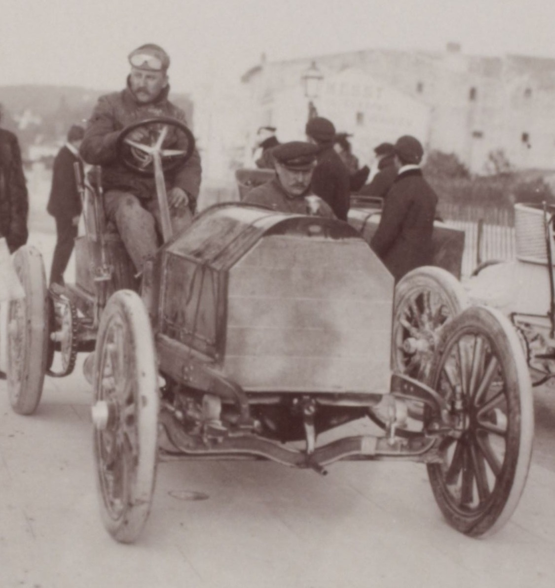 [Collection Jules Beau. Photographie sportive] : T. 20. AnnÃ©e 1903 / Jules Beau : F. 47. [Quinzaine de Nice, Concours de Mille et Coupes Henri Rothschild, 7 avril 1903]